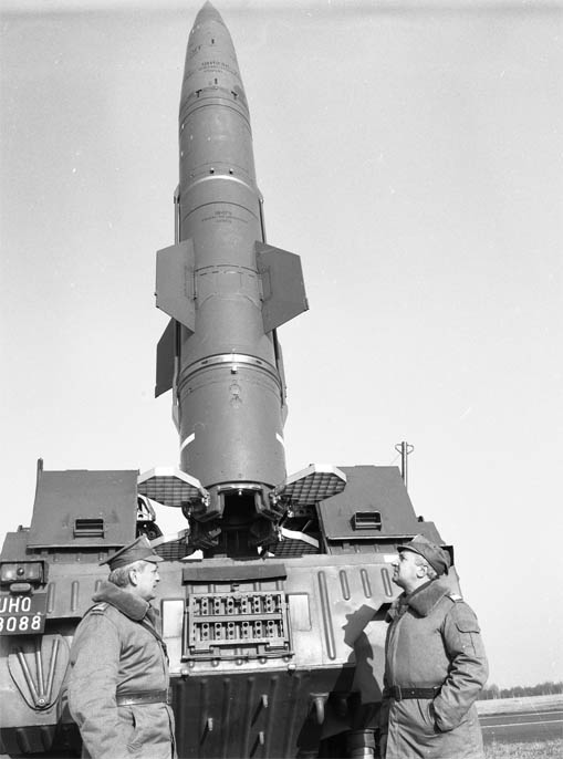 Pierwszy start Toczki w WP